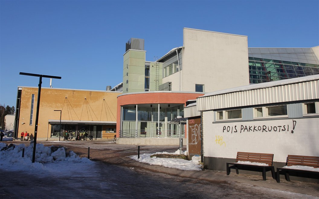 Pakkoruotsia vastustava, seinään maalattu mielipiteenilmaus Vantaan Korson kaupunginosassa, takana monitoimikeskus Lumo.